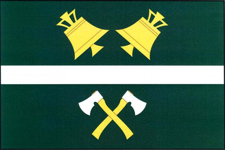 Ostrovec vlajka